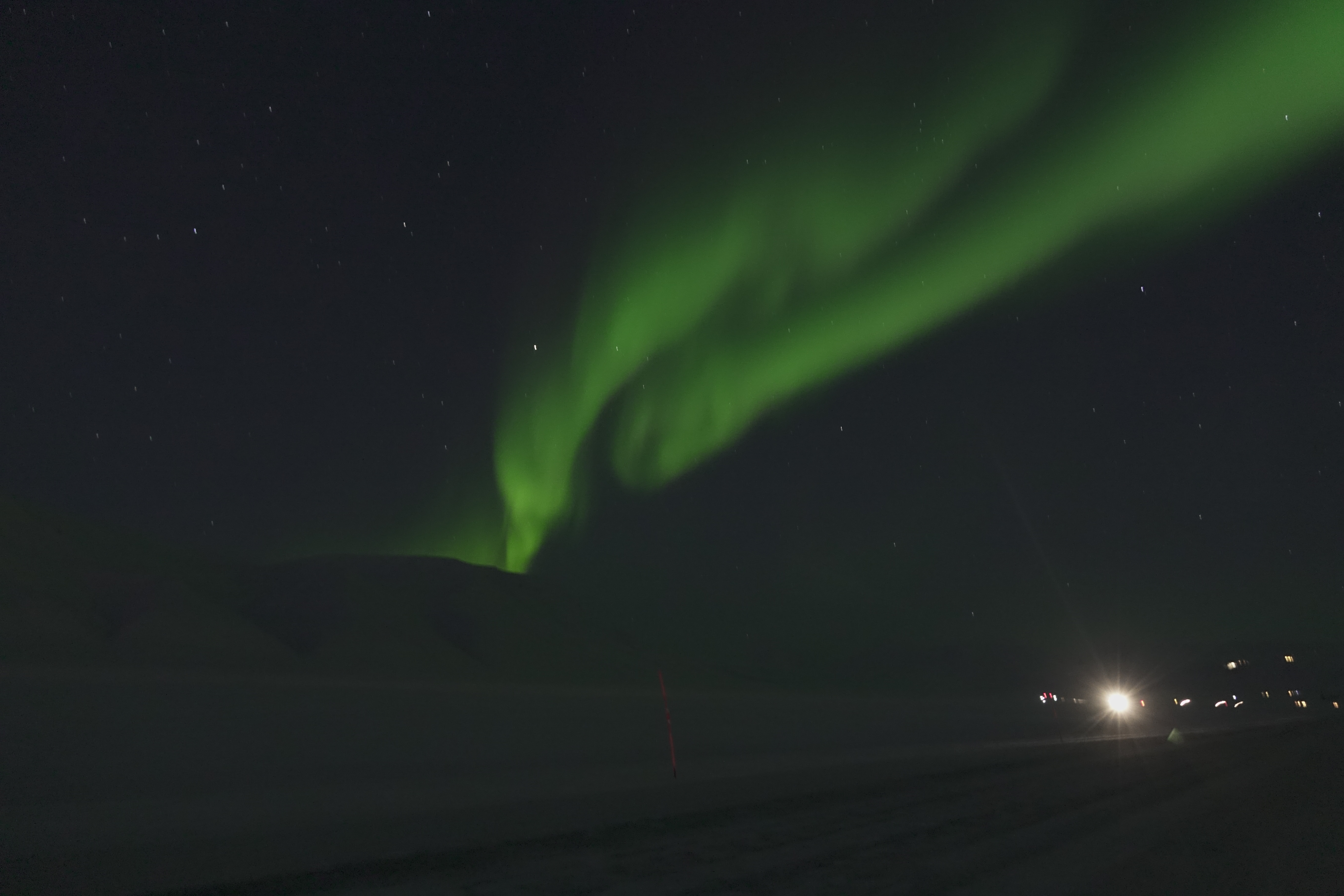 Aurora Boreal iluminando os céus em Adventdalen, a 5 km de Longyearbyen